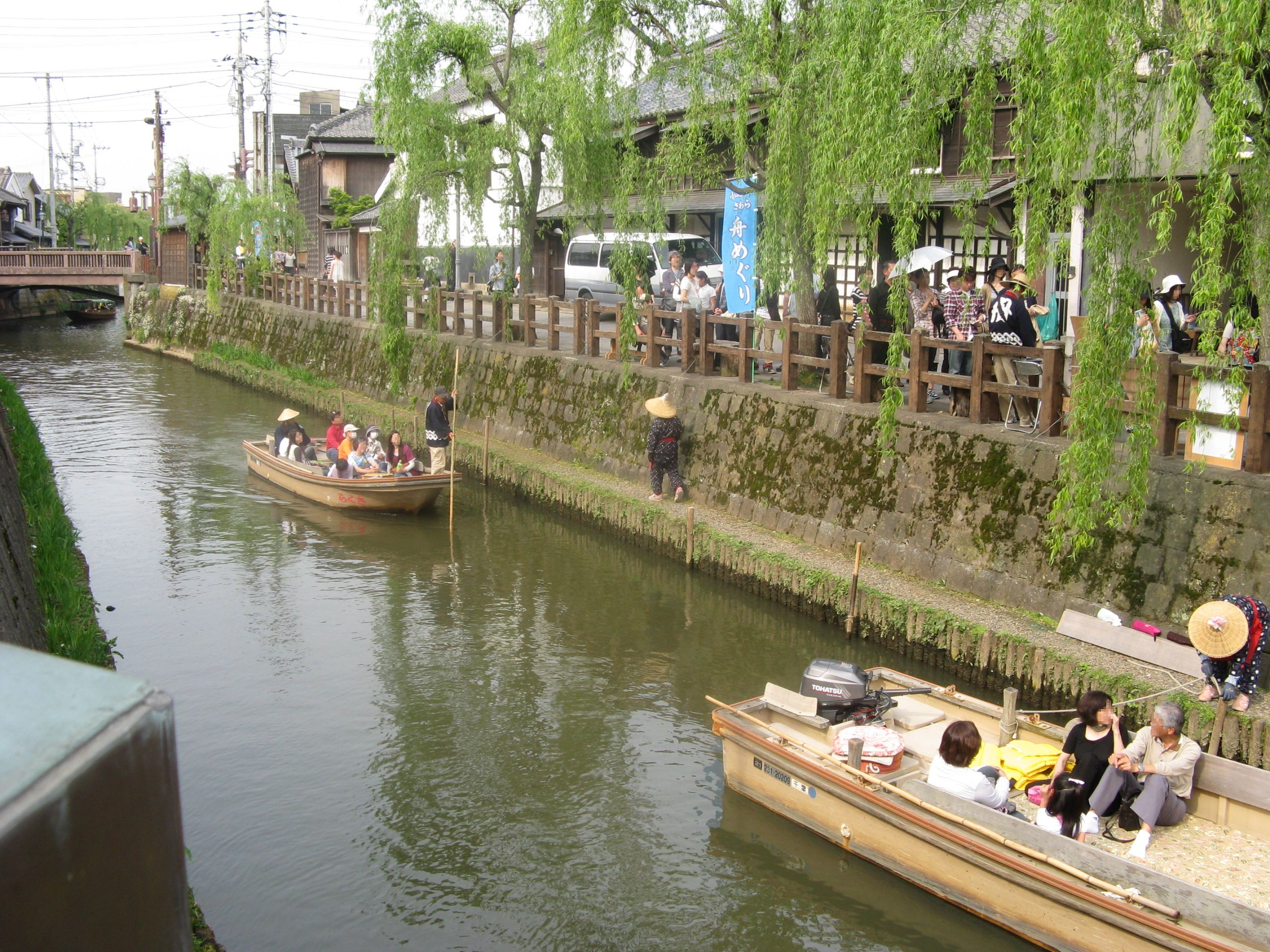 舟による小野川沿いの観光